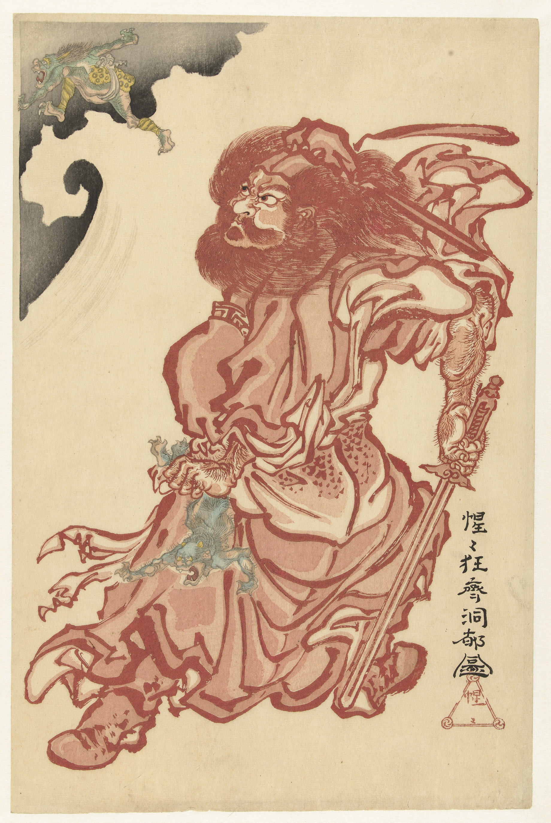 Man met zwaard en woeste baard, een demon in de linkerhand. Linksboven vlucht een tweede demon weg. Label Line: mentioned on object Kawanabe Kyôsai (1831 - 1889), ca. 1860, kleurenhoutsnede Collection: prenten; Japan (collectie)